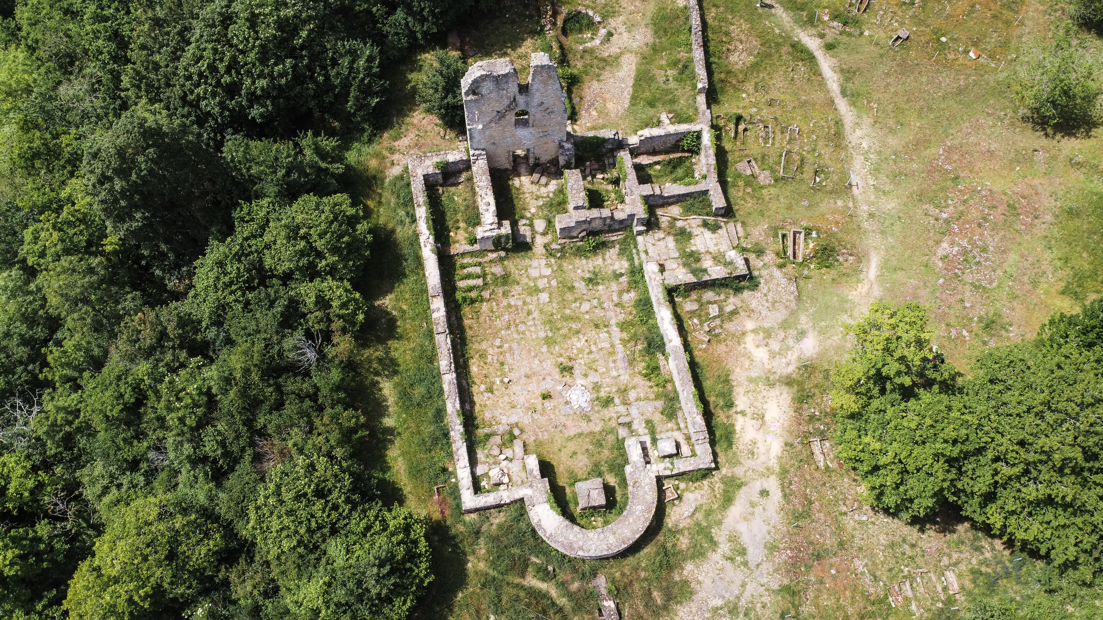 Site archéologique du Mont-Saint-Germain